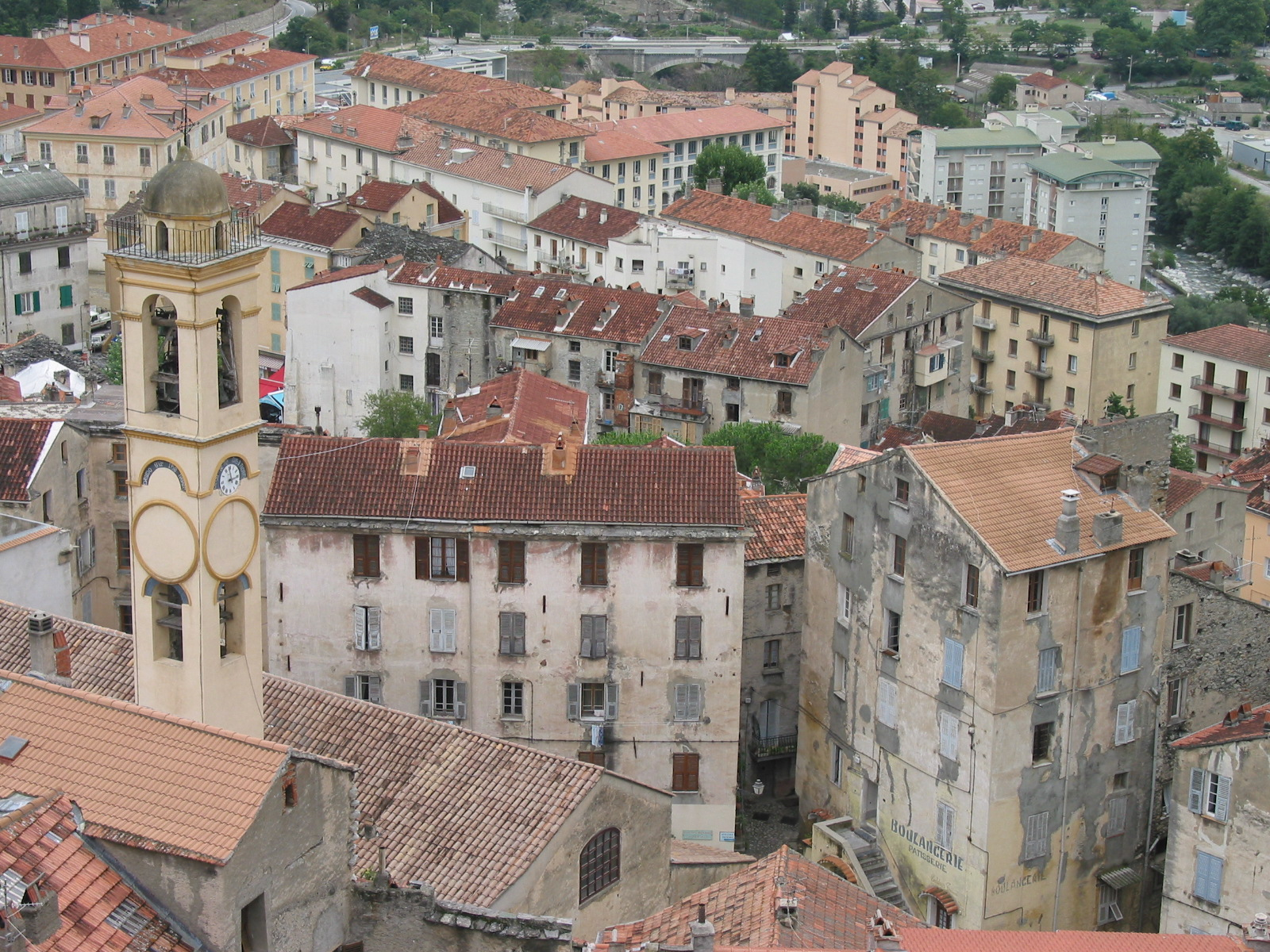 Corte (Haute-Corse, France) - Le campanile de l'Église de l'Annonciation dominant le quartier.